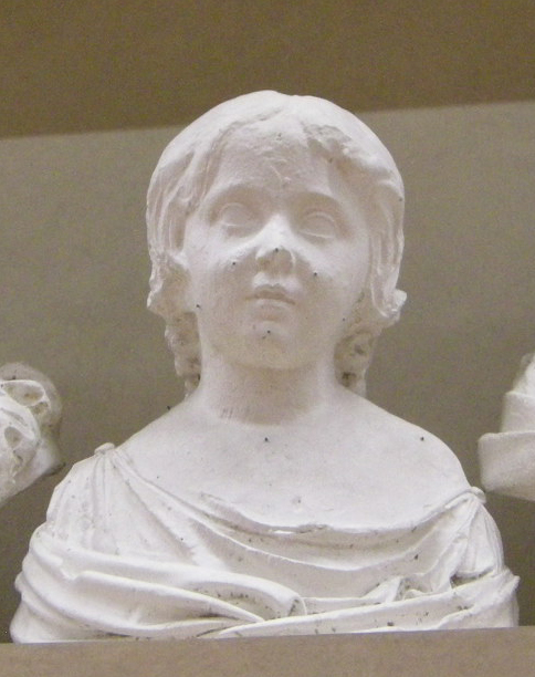 Lorenzo bartolini, ritratto di elisa bonaparte da bambina, gesso